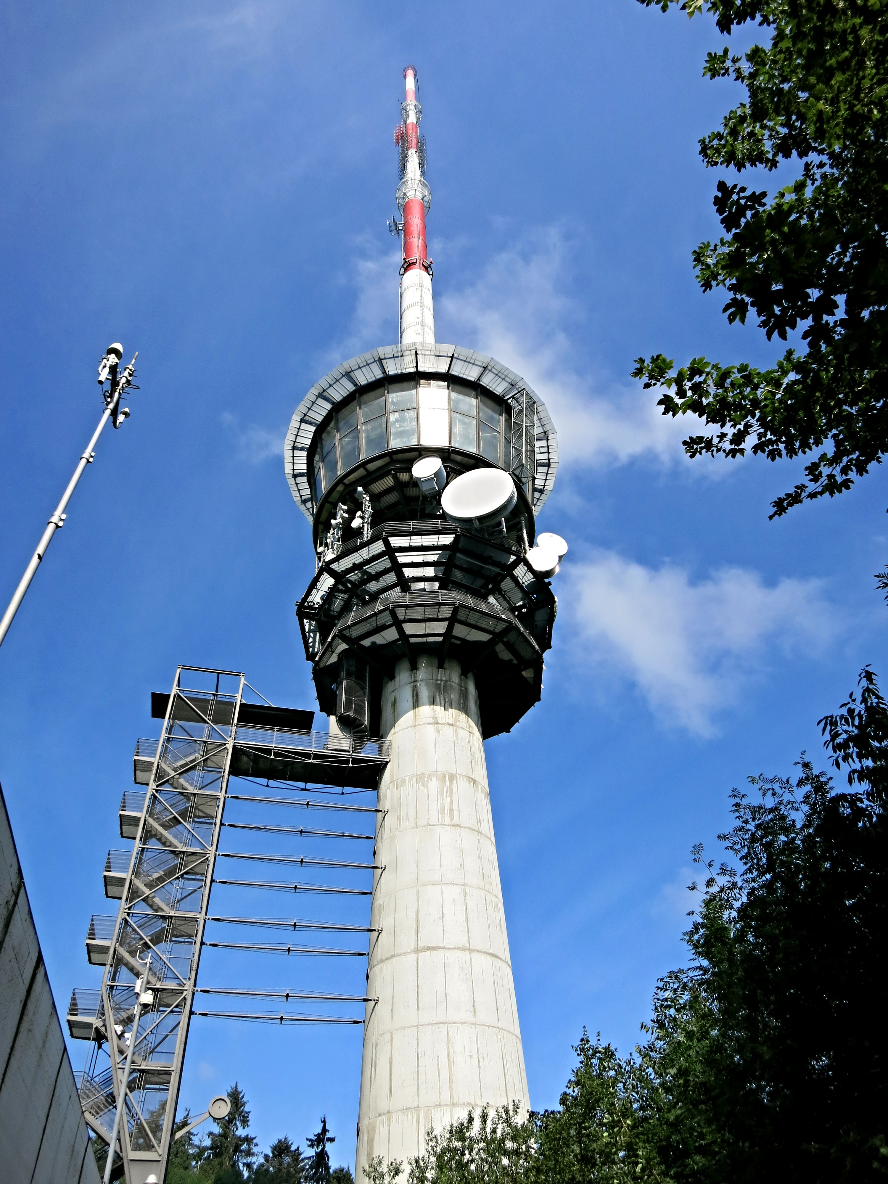 Fernsehturm Bantiger